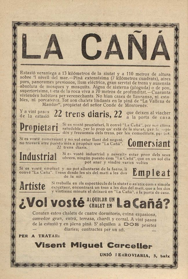 Anuncis de xalets a La Canyada, Vicent Miquel Carceller.